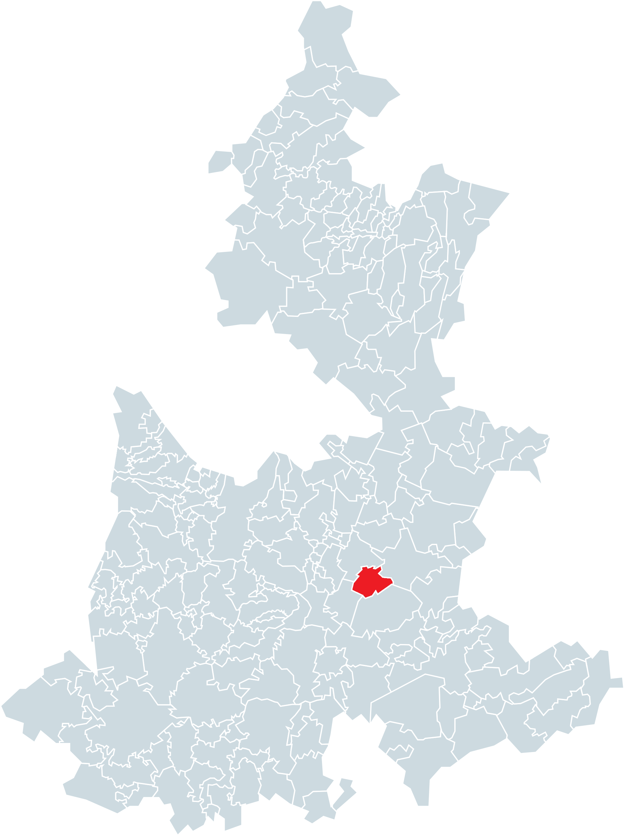 Municipio de Yehualtepec